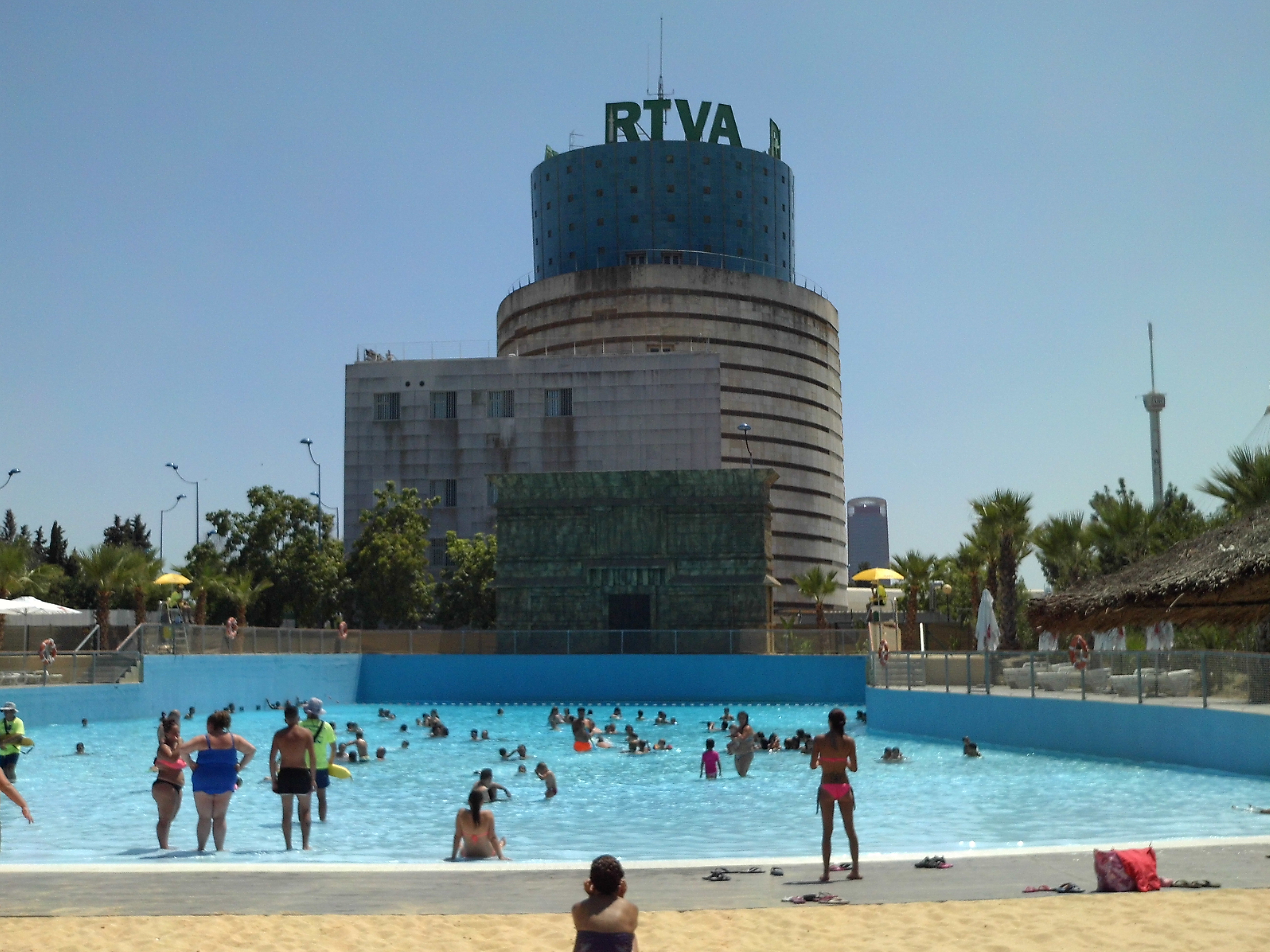 Playa Quetzal de Agua Mágica, dentro del recinto de Isla Mágica. Sevilla, Andalucía, España.